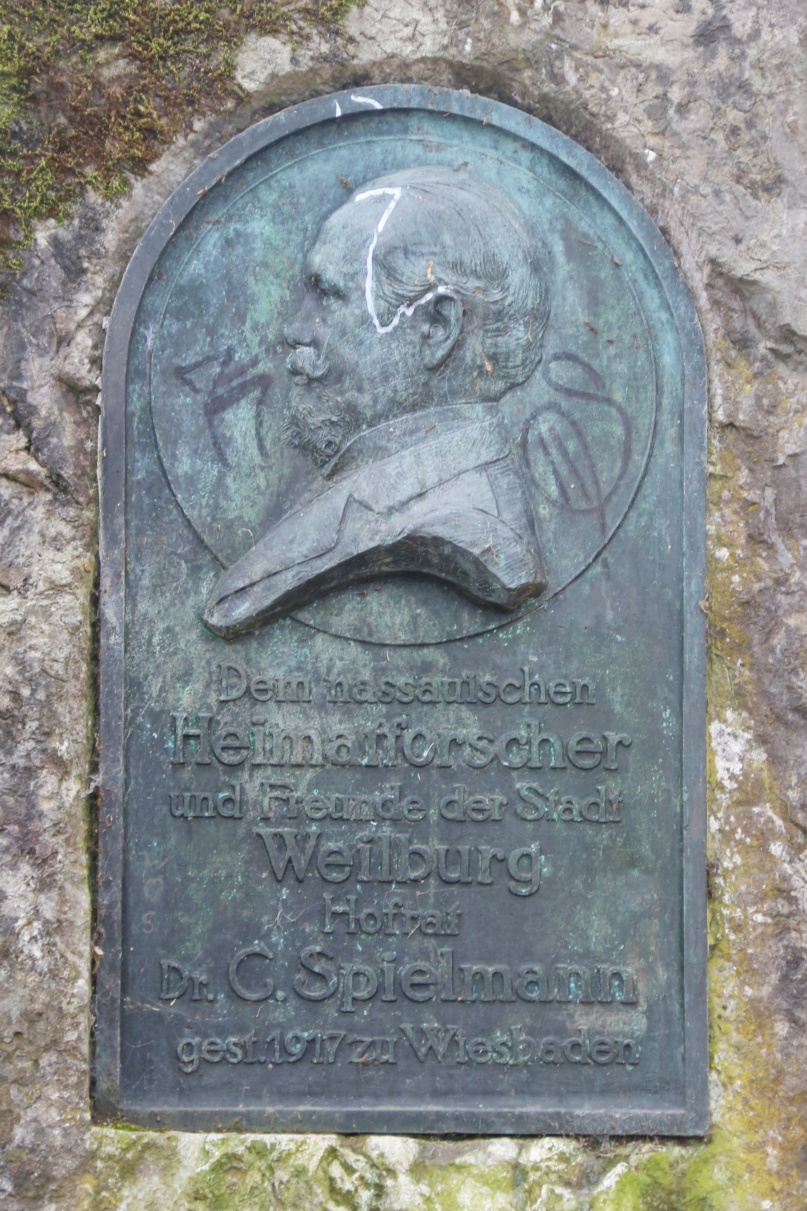 Weilburg